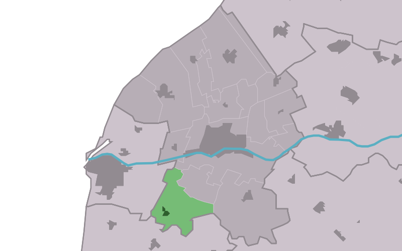 Kaartsje fan himrik fan Achlum